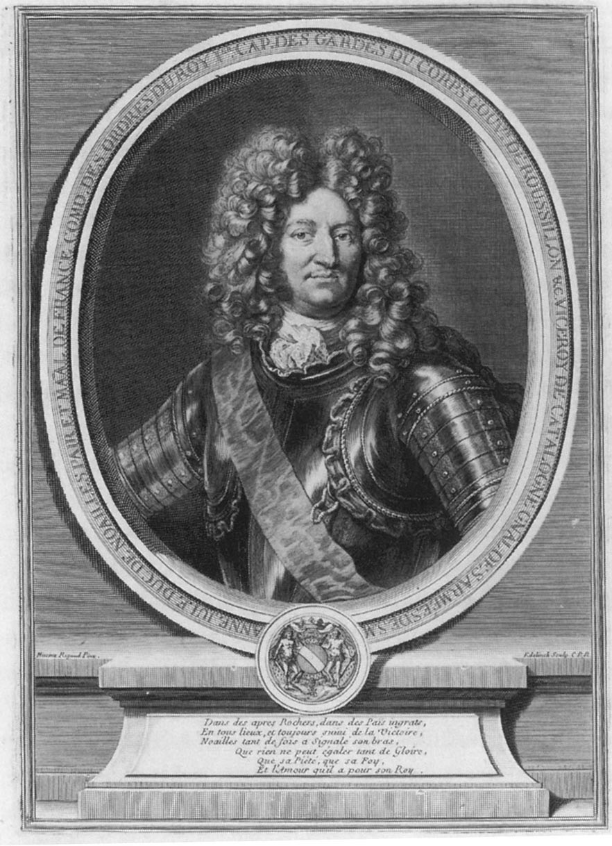 Portrait d'Anne-Jules de Noailles (1650-1708), maréchal de France